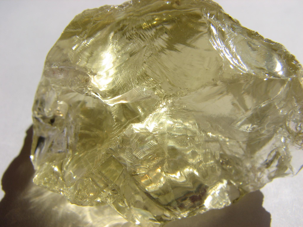 Large piece of lemon colored citrine, Brazil